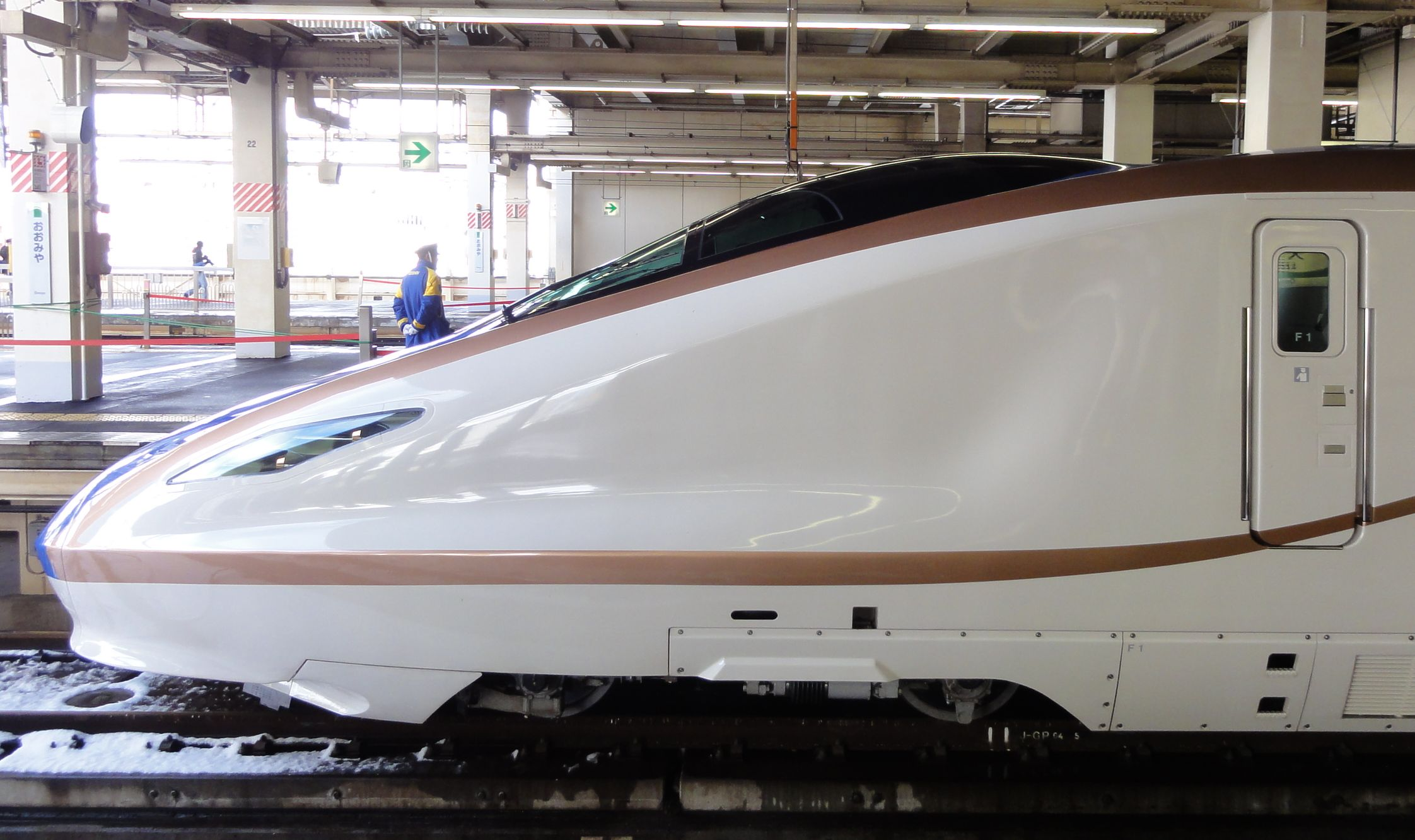 新幹線E7系